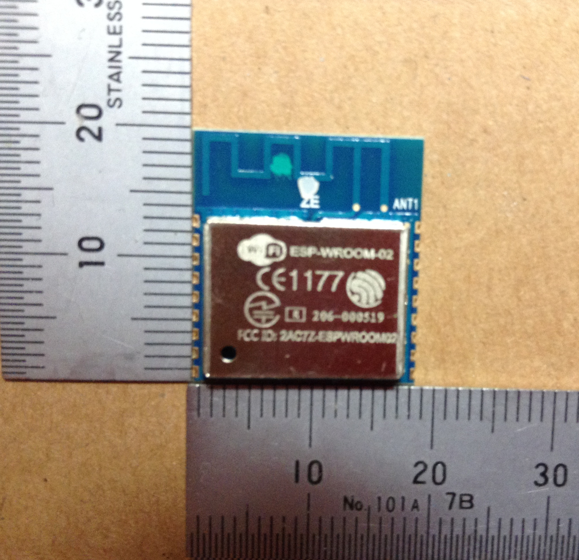 WiFiモジュール ESP-WROOM-02(ESP8266)